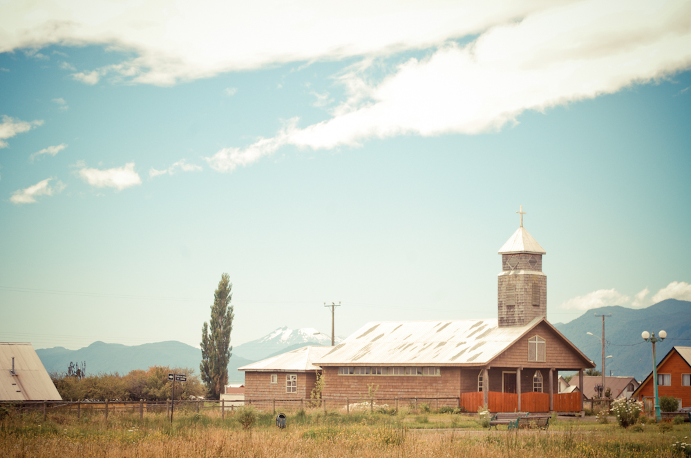 Fotos de mi paseo a la carretera austral, Ruta 7. Hualaihué es una comuna de la X Región de los Lagos, ubicada en la Provincia de Palena. La comuna de Hualaihué fue fundada el 21 de septiembre de 1979, designándose como capital comunal a Hornopirén.